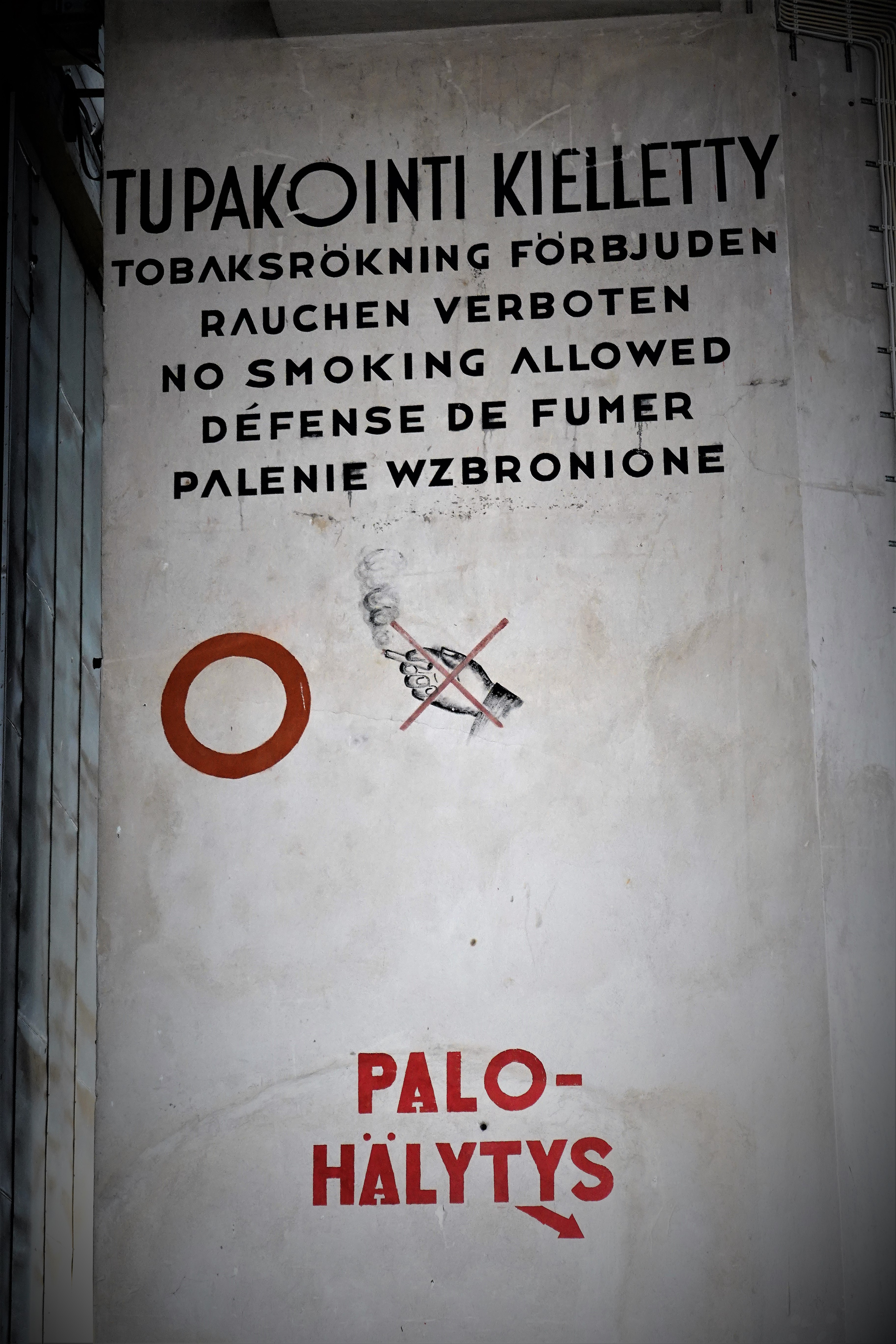 tupakoinnin kieltokyltti suomeksi, ruotsiksi, saksaksi, englanniksi, ranskaksi ja puolaksi